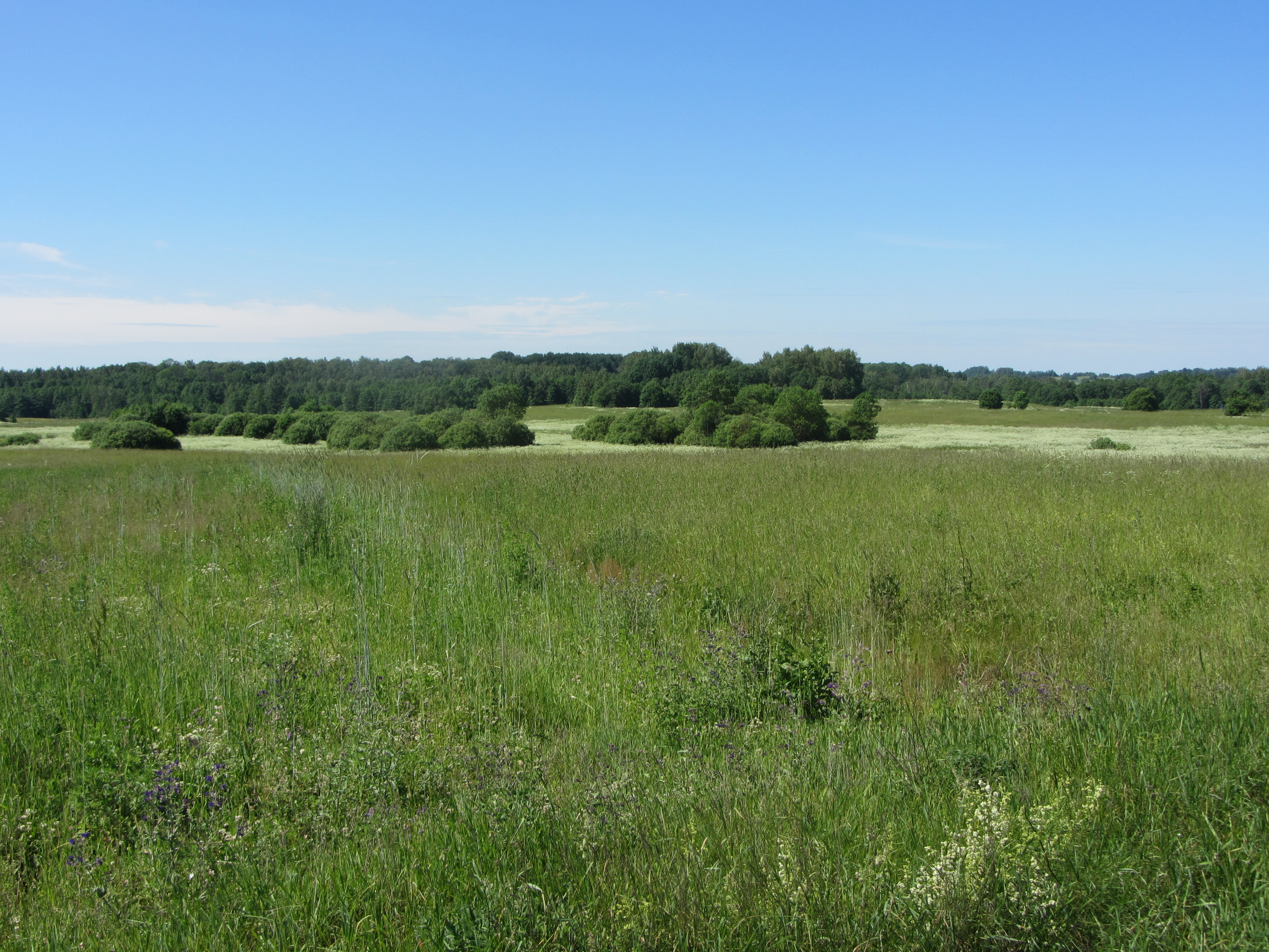 Suvieko sen., Lithuania